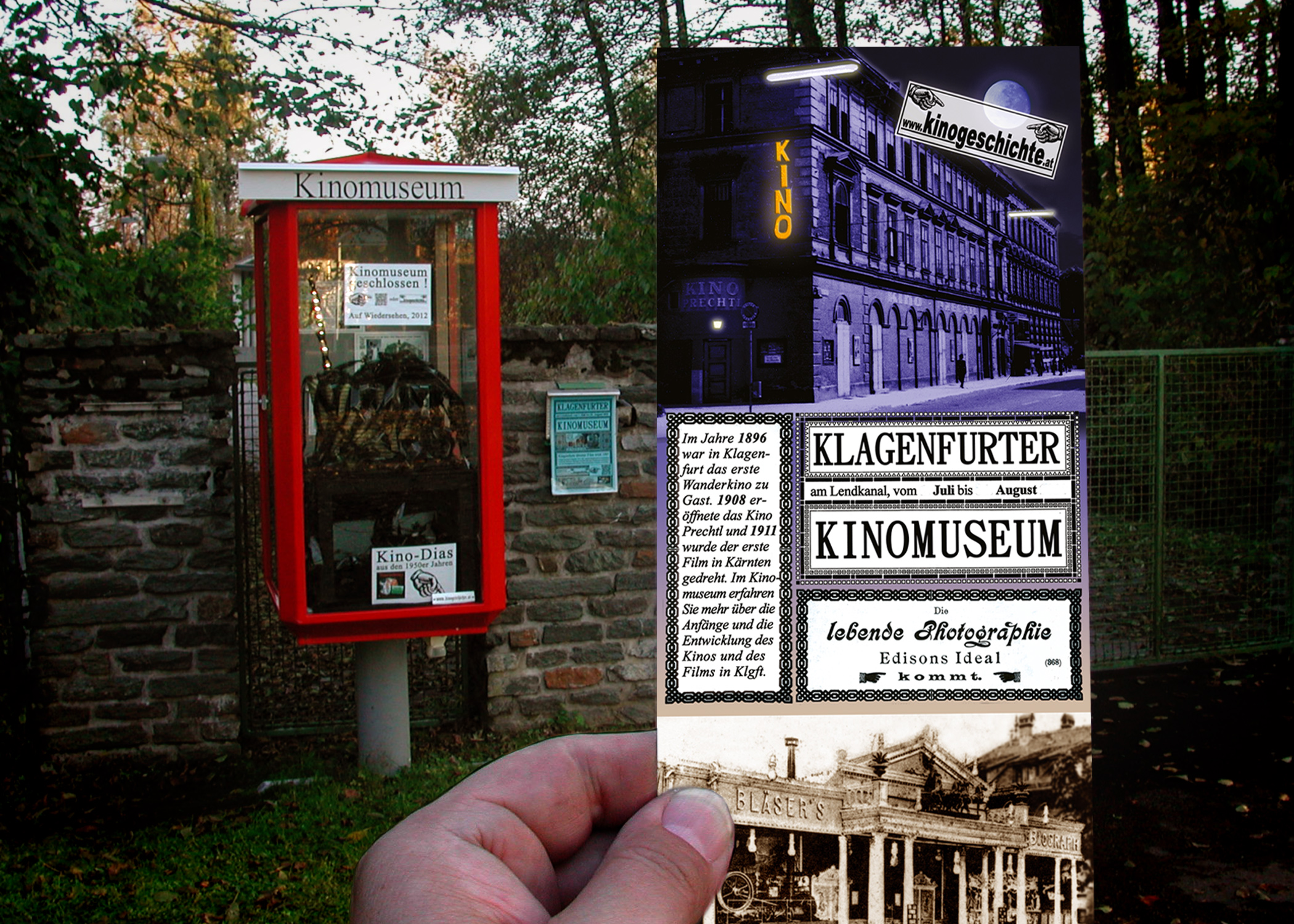 Eingangstor des Kinomuseum Klagenfurt mit Schaukasten und Flugblatt